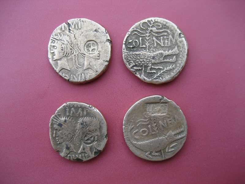 Vier Münzen (Nemausus-Asse), geprägt in Nîmes (Südfrankreich) zwischen 16 - 8 v. Chr., gefunden im Lager I., Römerlager Hedemünden